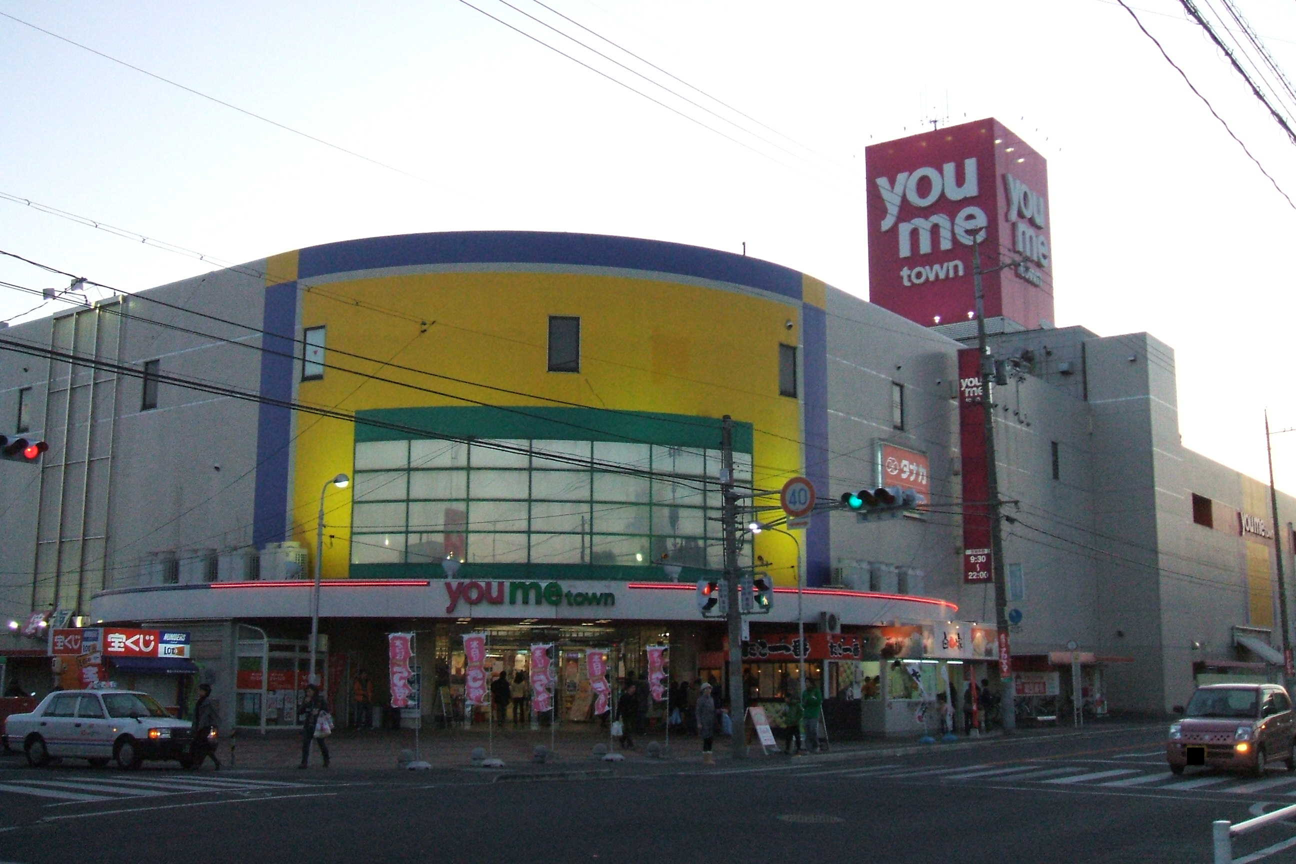 広島県福山市にあるゆめタウン蔵王の外観ja:ゆめタウン蔵王